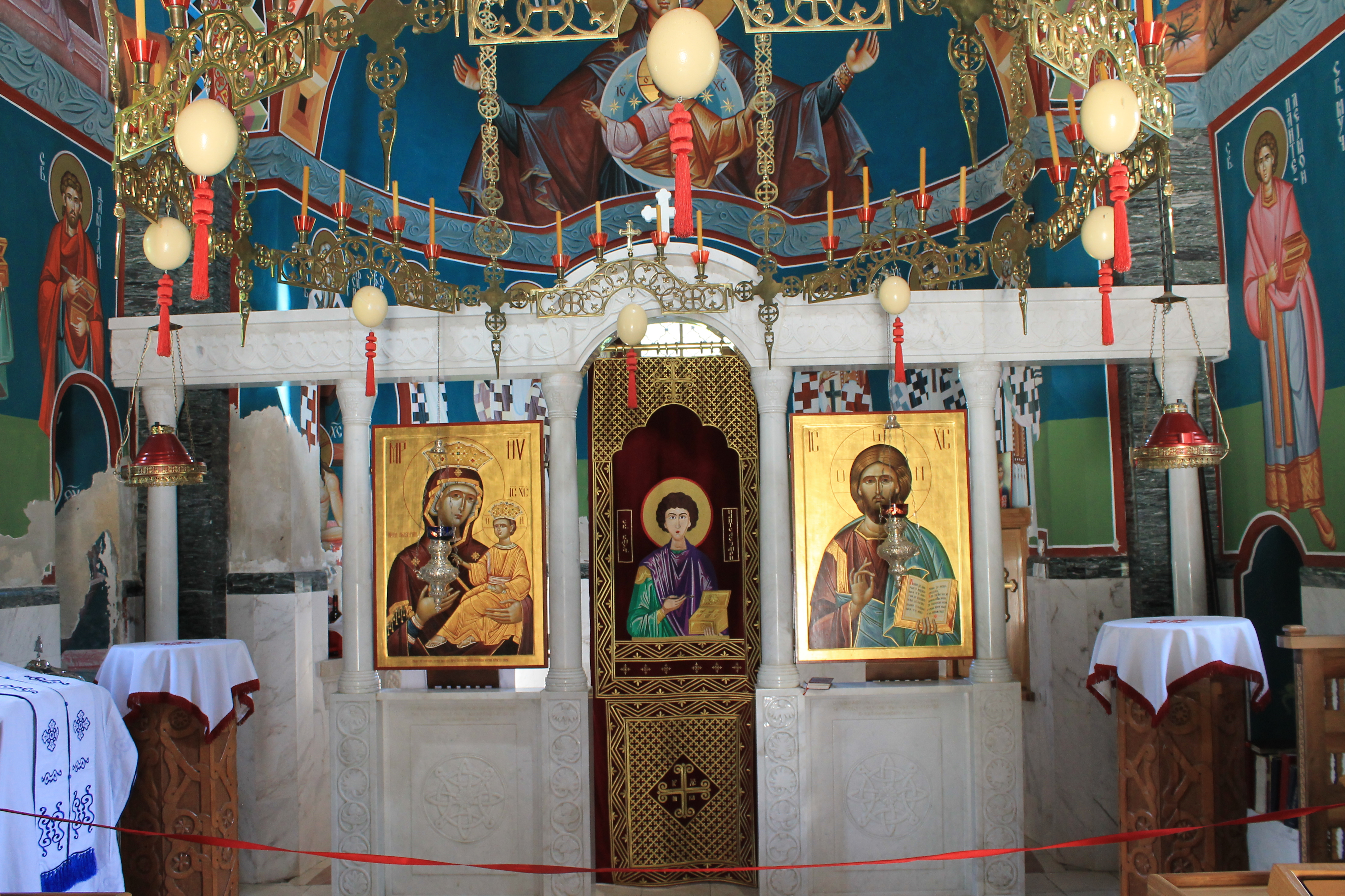 Manastir Staro Hopovo, april 2018.